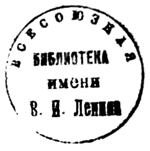 Печать Ленинской библиотеки 40-х годов